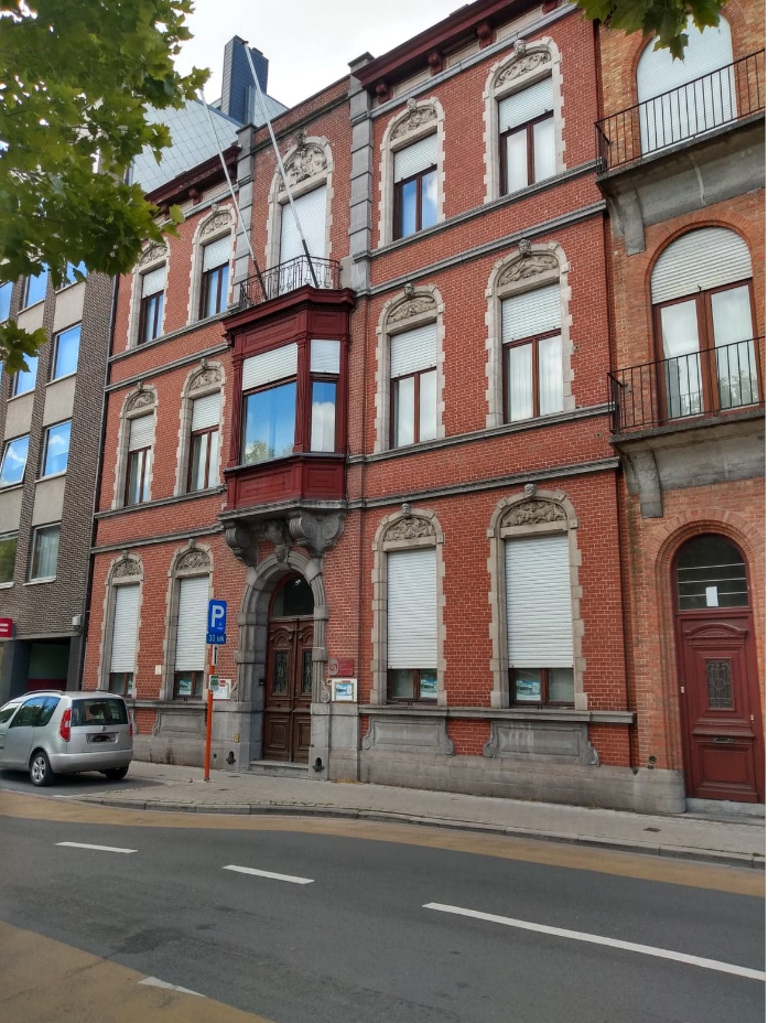 Herenhuis Arthur Delbeke bij het Sint-Amandsplein in Roeselare. Huis werd afgebrand in 1914, maar is gerestaureerd.